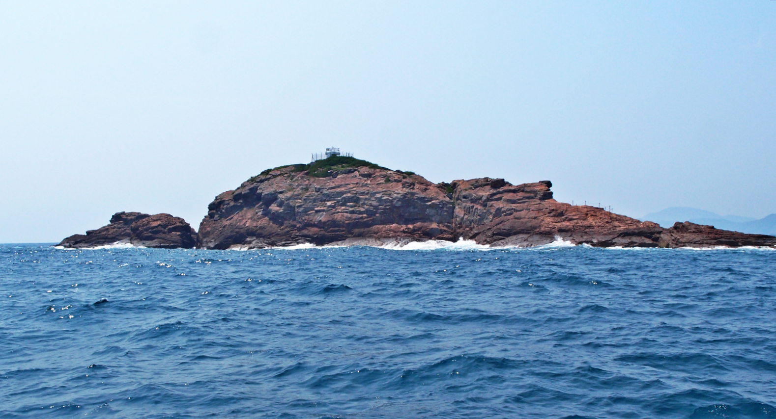 中文（香港）: 石牛洲的東岸